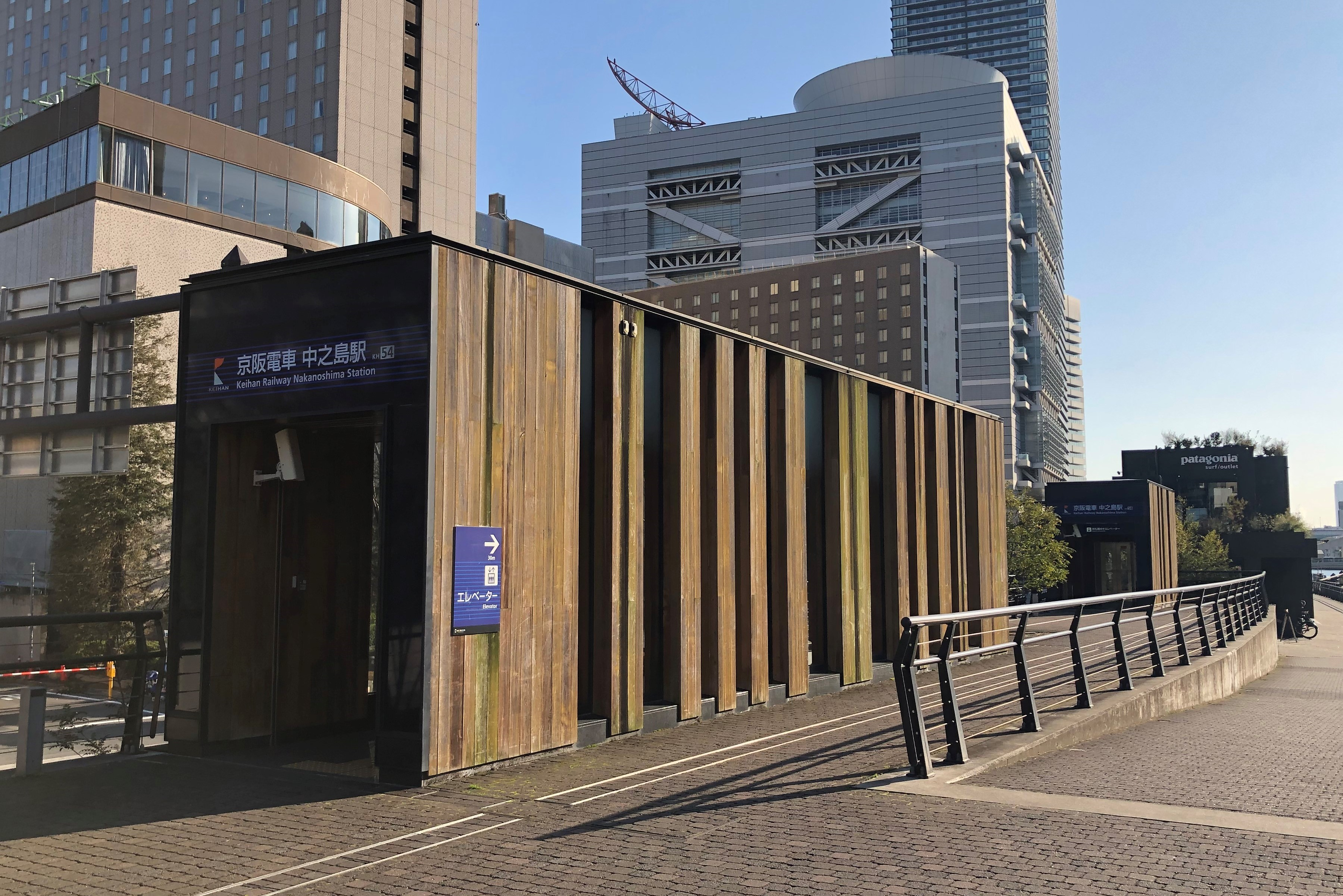 京阪電鉄中之島駅